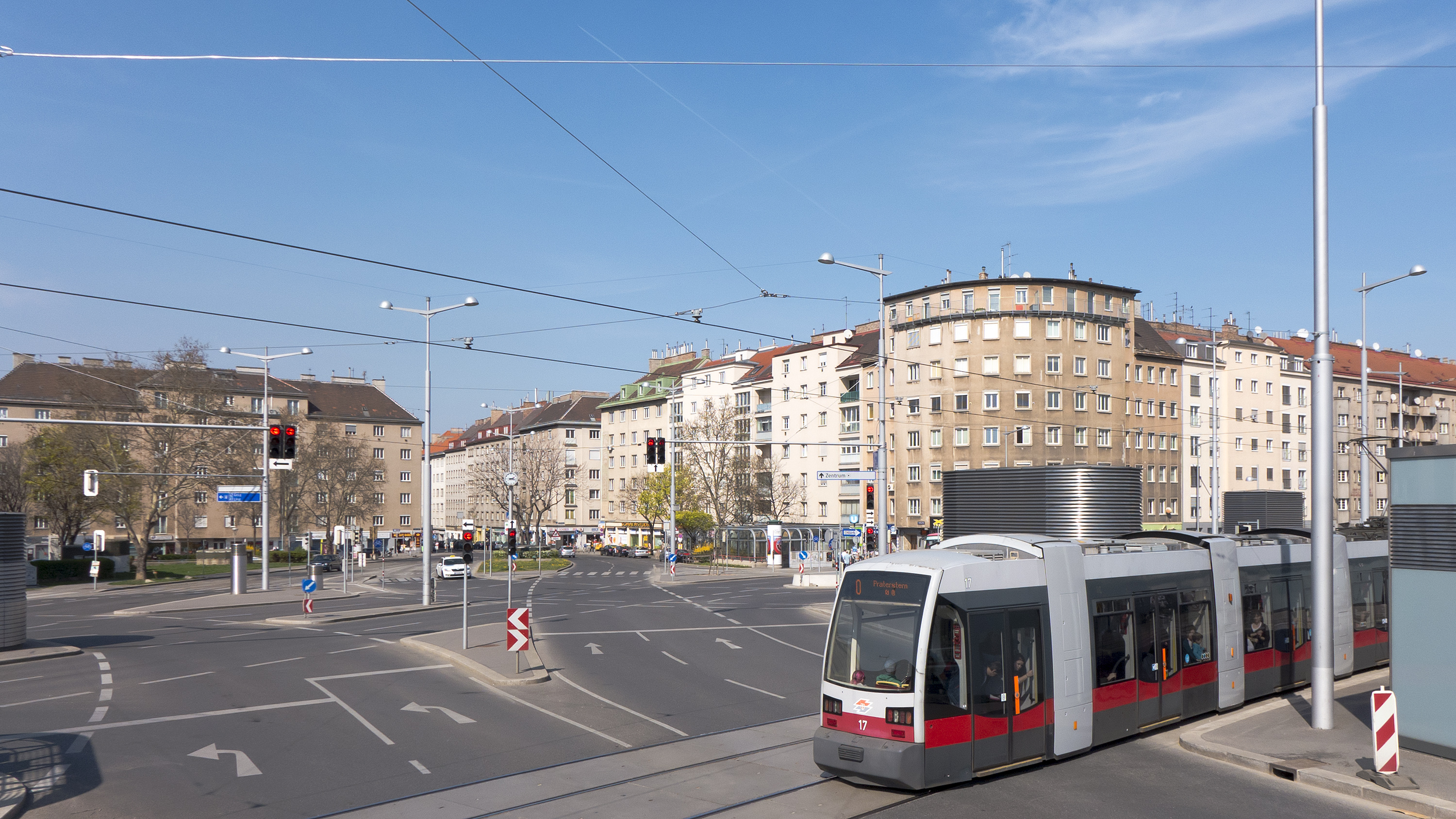 Südtiroler Platz in Wien 4 Richtung Nordosten